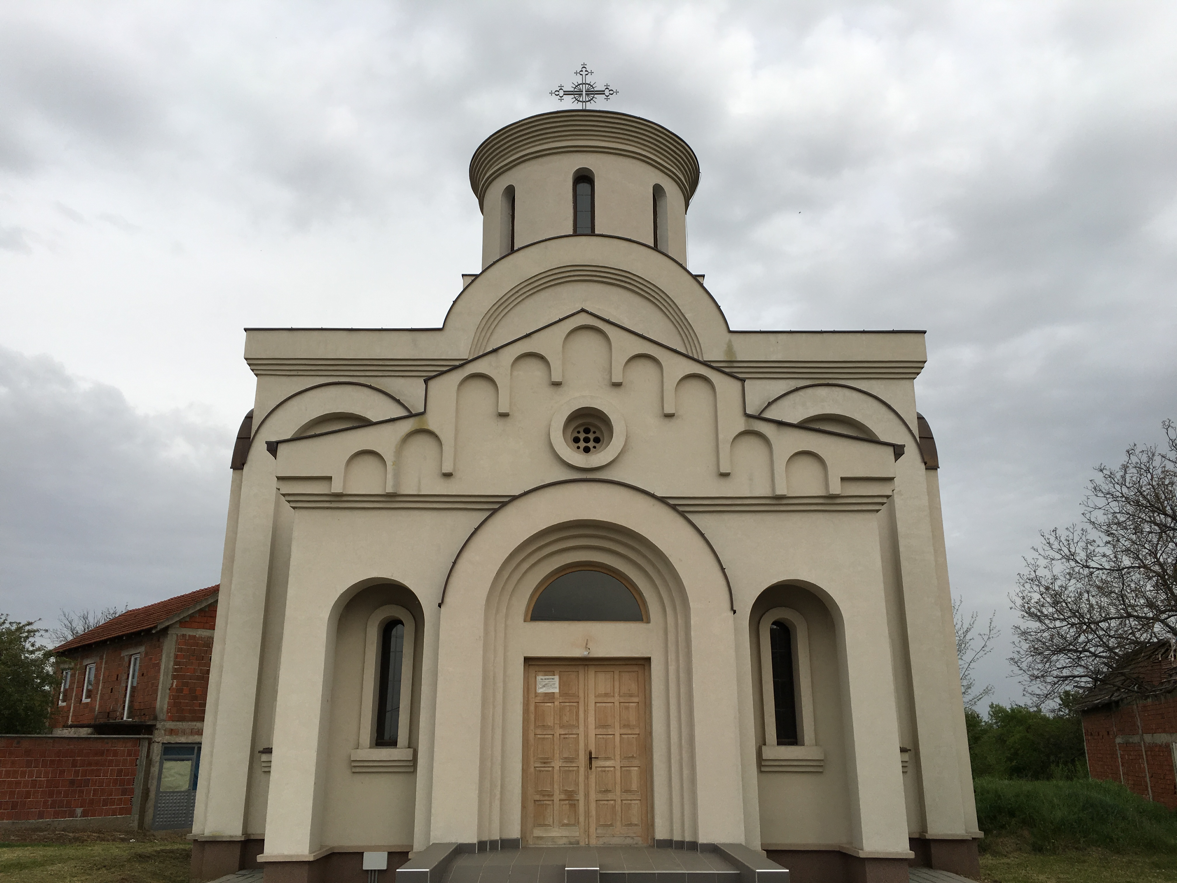 Srpski (latinica): Crkva Svetog Nikole, Bojnik, Leskovac